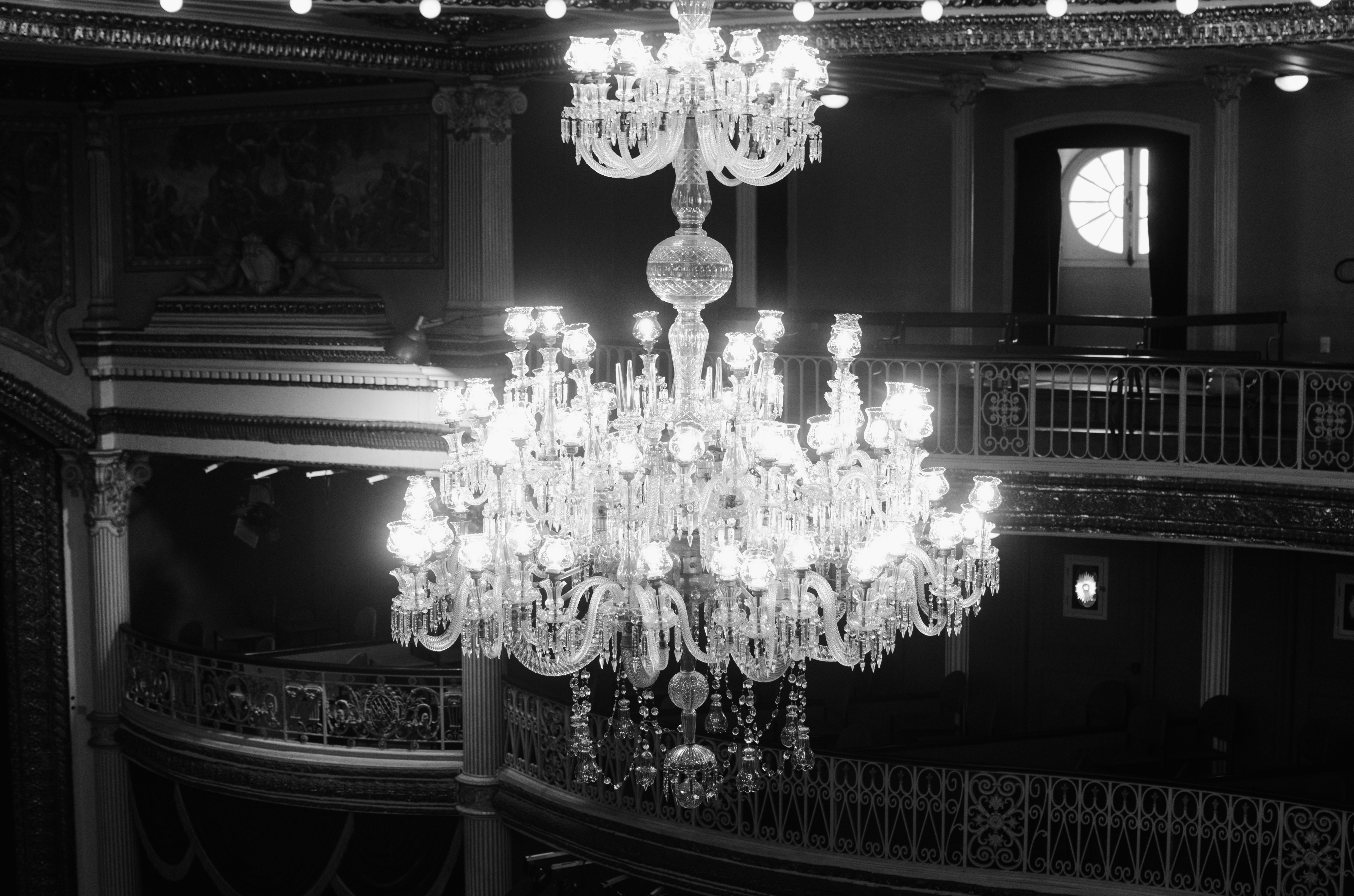 Detalhes do grande lustre localizado no centro do teto principal do teatro.